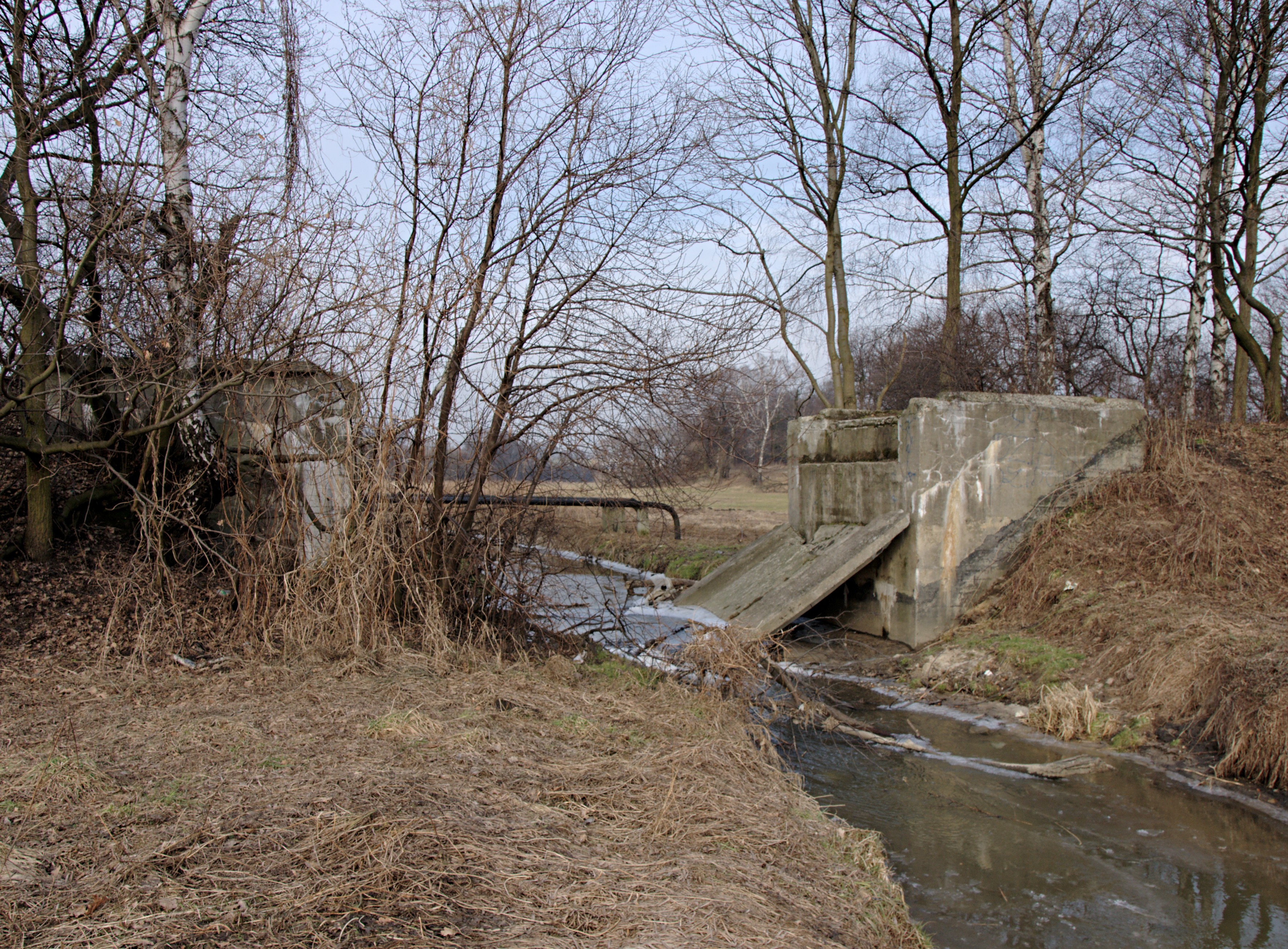 Zerwany most tramwajowy w Mikulczycach. Pozostałość po zlikwidowanej linii tramwajowej Zabrze-Mikulczyce - Bytom-Stolarzowice.